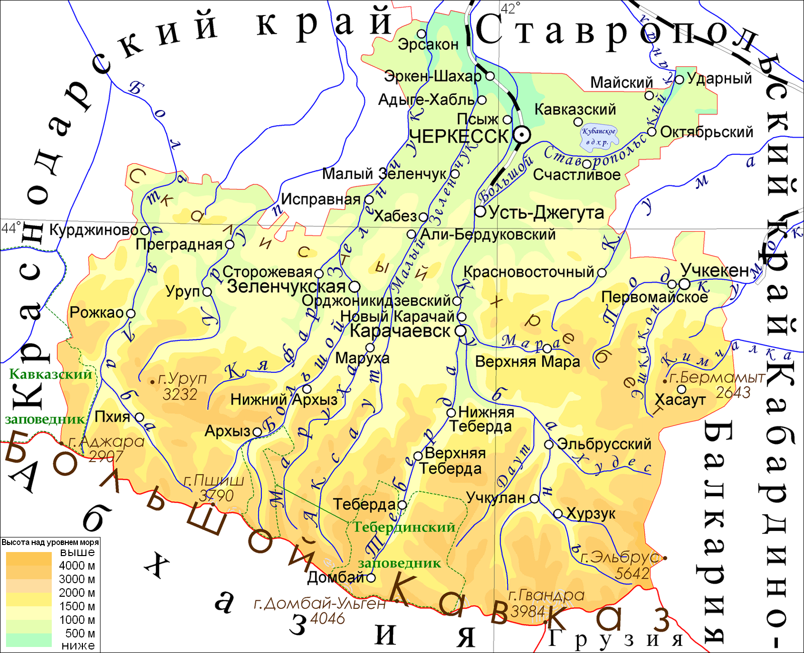 физическая карта Карачаево-Черкесии